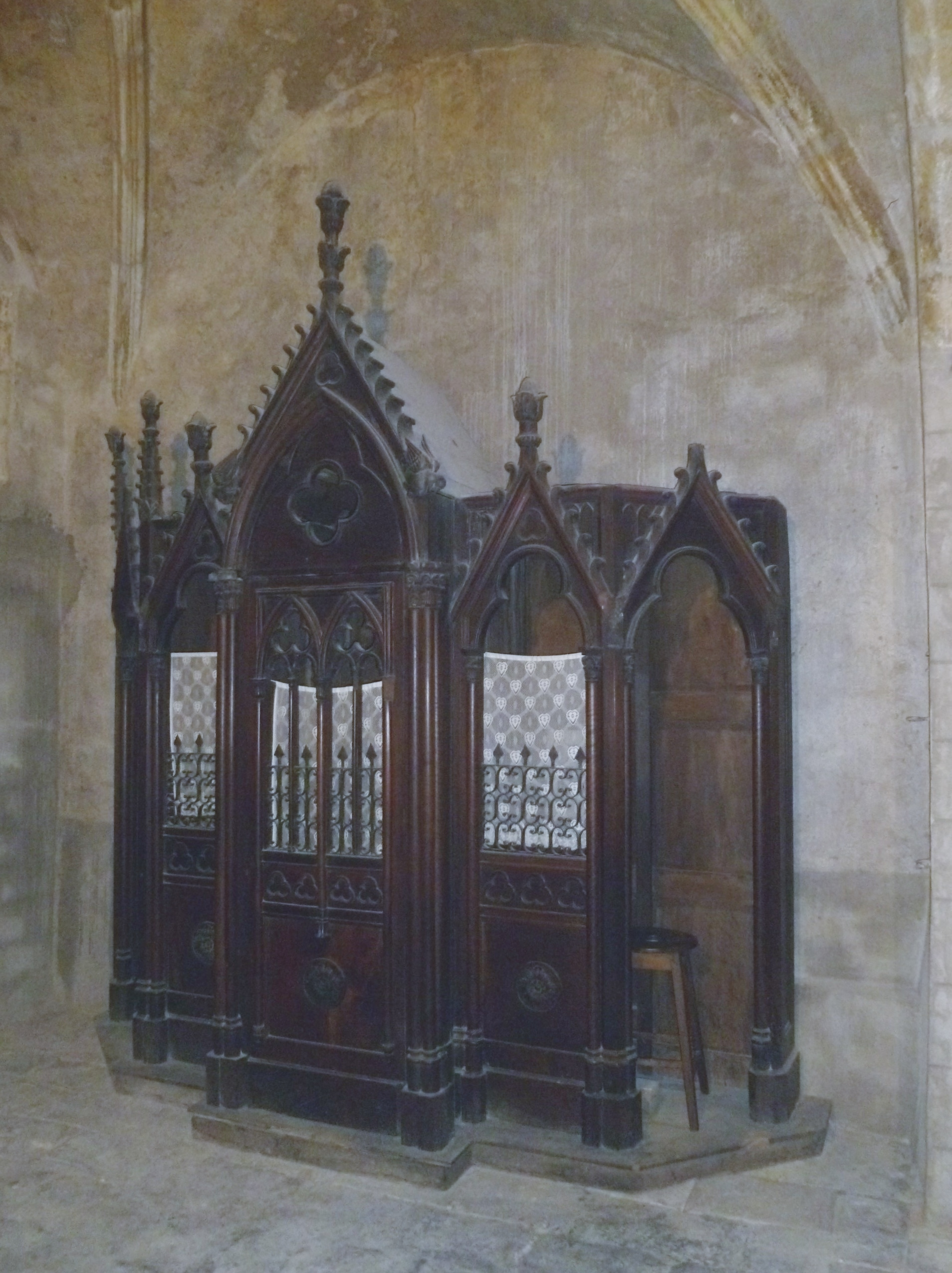 Confessionnal de l' Église Saint-Pierre de Joyeuse, France